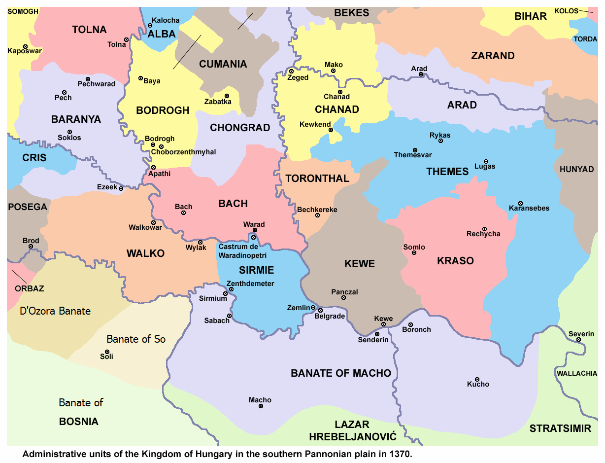 H-U kraljevstvo u podunavlju i okolici 1370